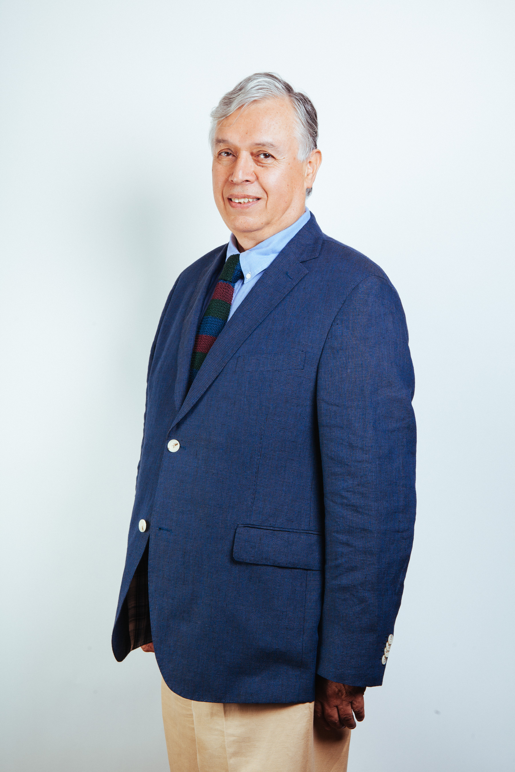 Ministro de Estado del segundo gobierno de Michelle Bachelet (2014-2018)